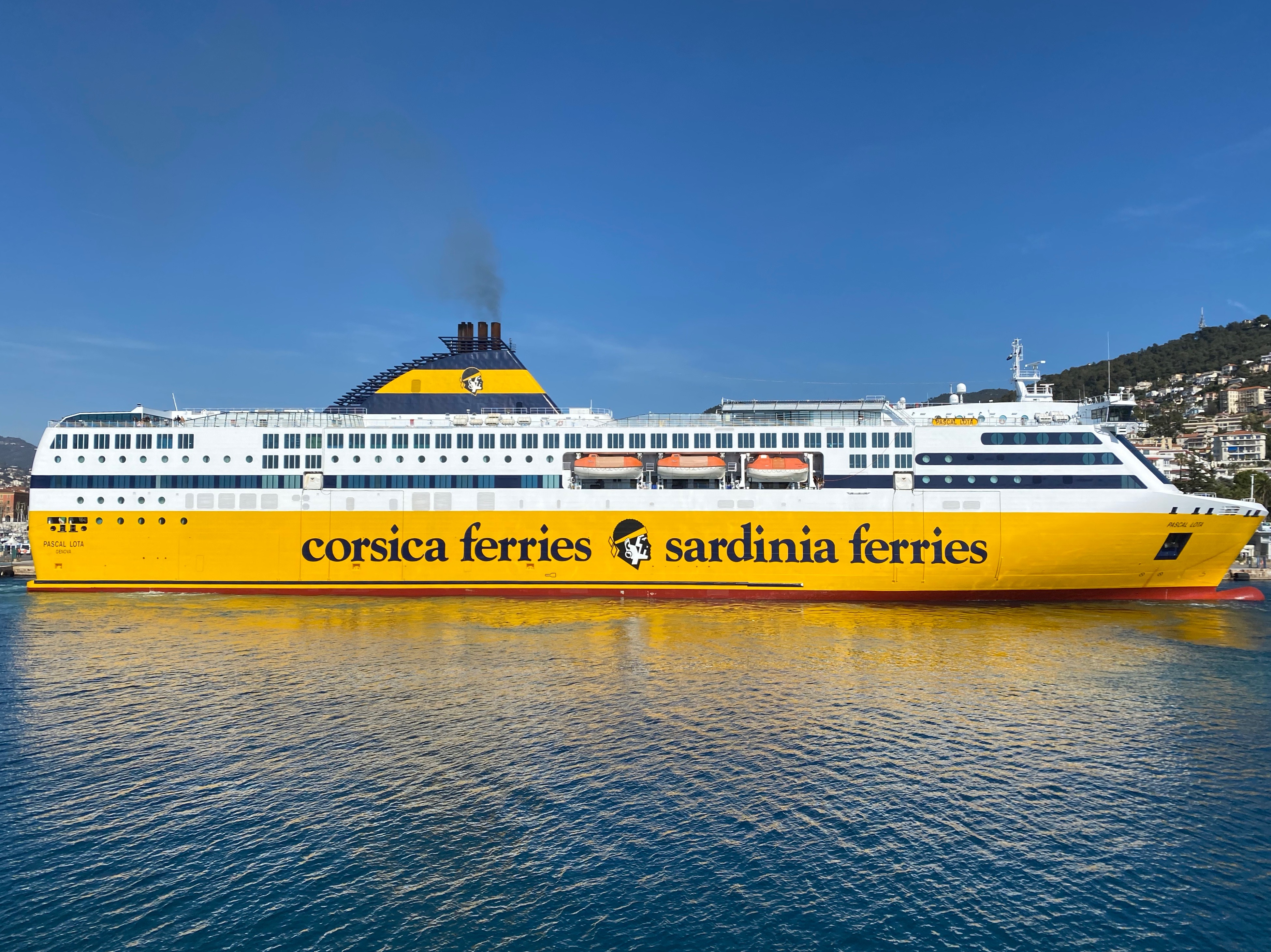 Le car-ferry Pascal Lota de la compagnie Corsica Ferries à Nice en février 2020.